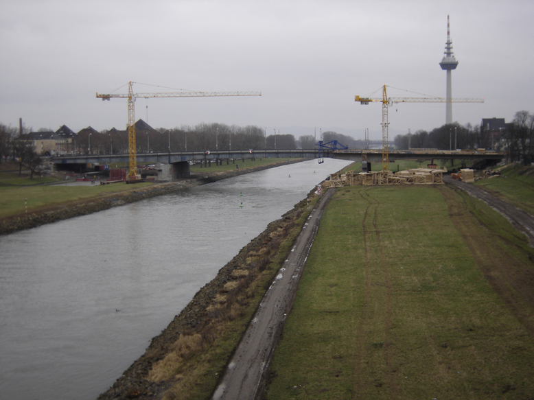 Friedrich-Ebert-Brücke Mannheim 2006 Neubau.